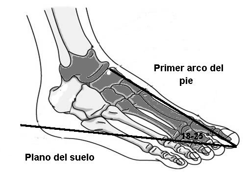 Imagen del esqueleto del pie. En sombreado aparece el pie astragalino